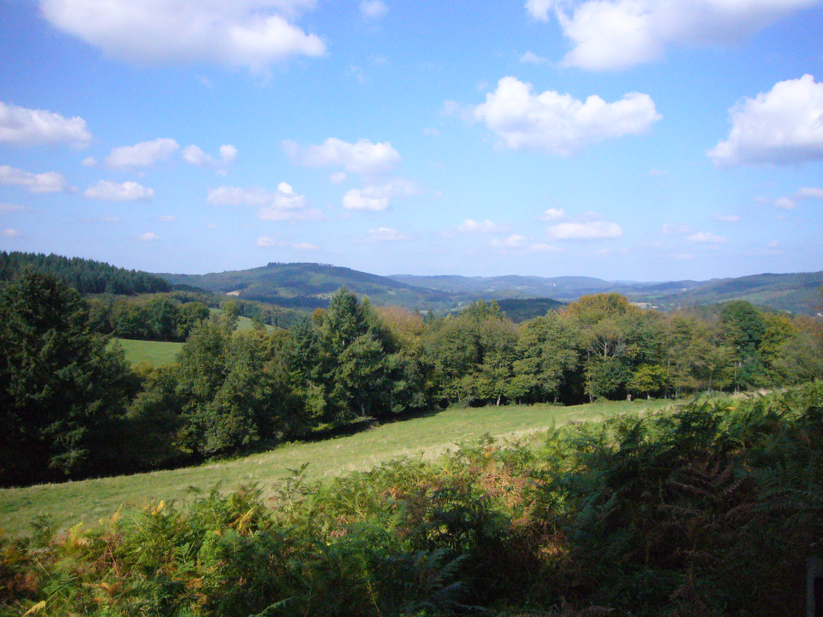 Paysage de la montagne limousine près de Nedde, Haute-Vienne, France